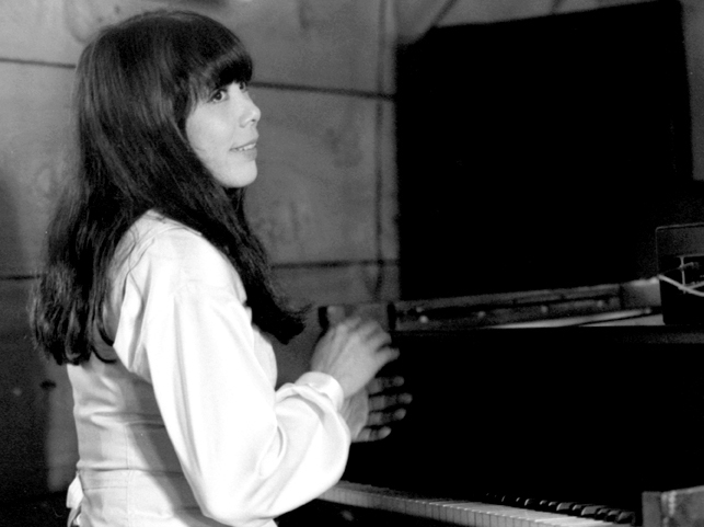 Toshiko Akiyoshi in 1978. (Photo: Brian McMillen / )